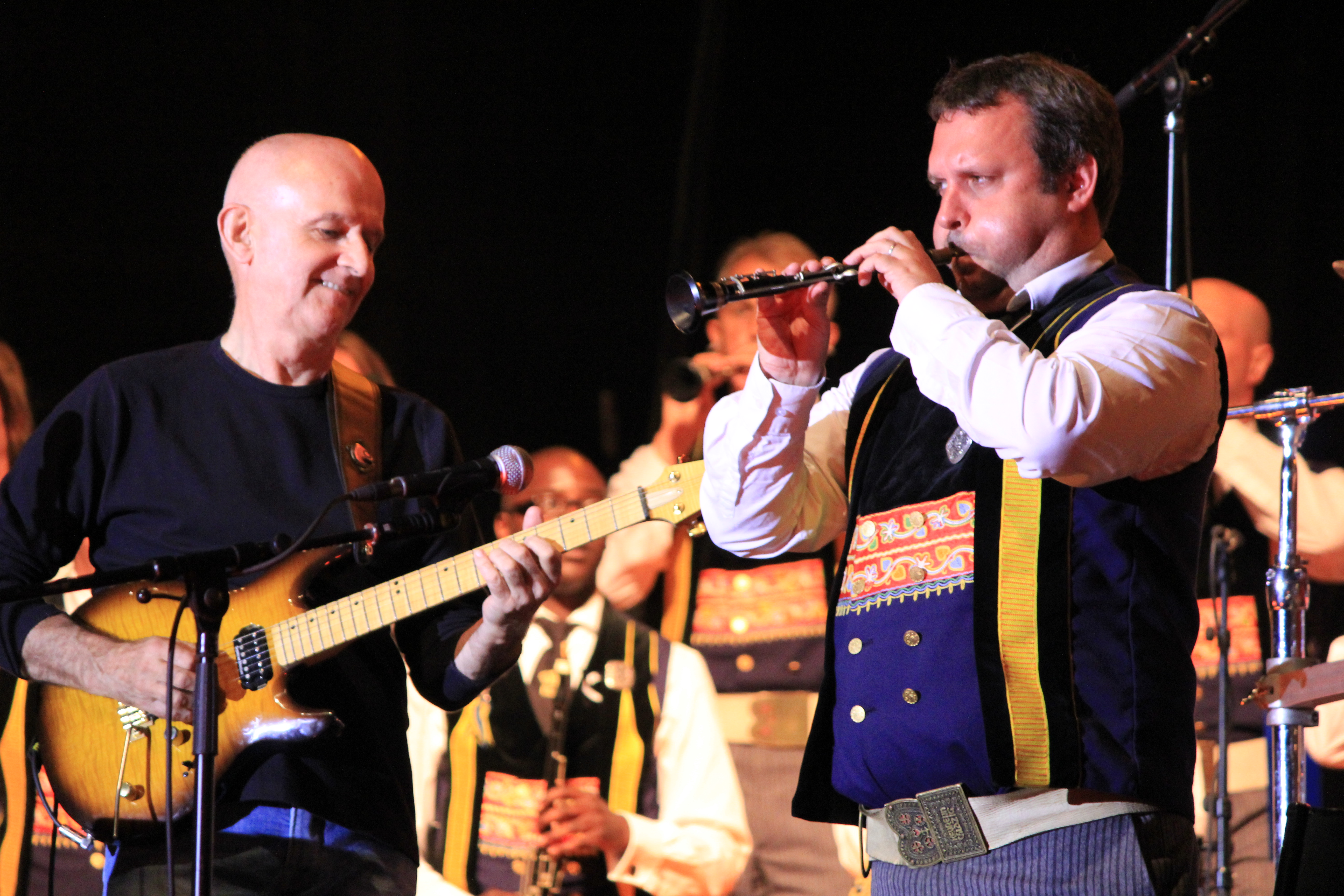 Dan Ar Braz et le penn-sonneur du Bagad Kemper Steven Bodénès lors de son concert inaugural de la tournée liée à la promotion de l'album Celebration, lors du Festival Interceltique de Lorient 2012.